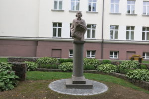 L. Stuokos-Gucevičiaus paminklas prie jo vardo mokyklos Kupiškyje